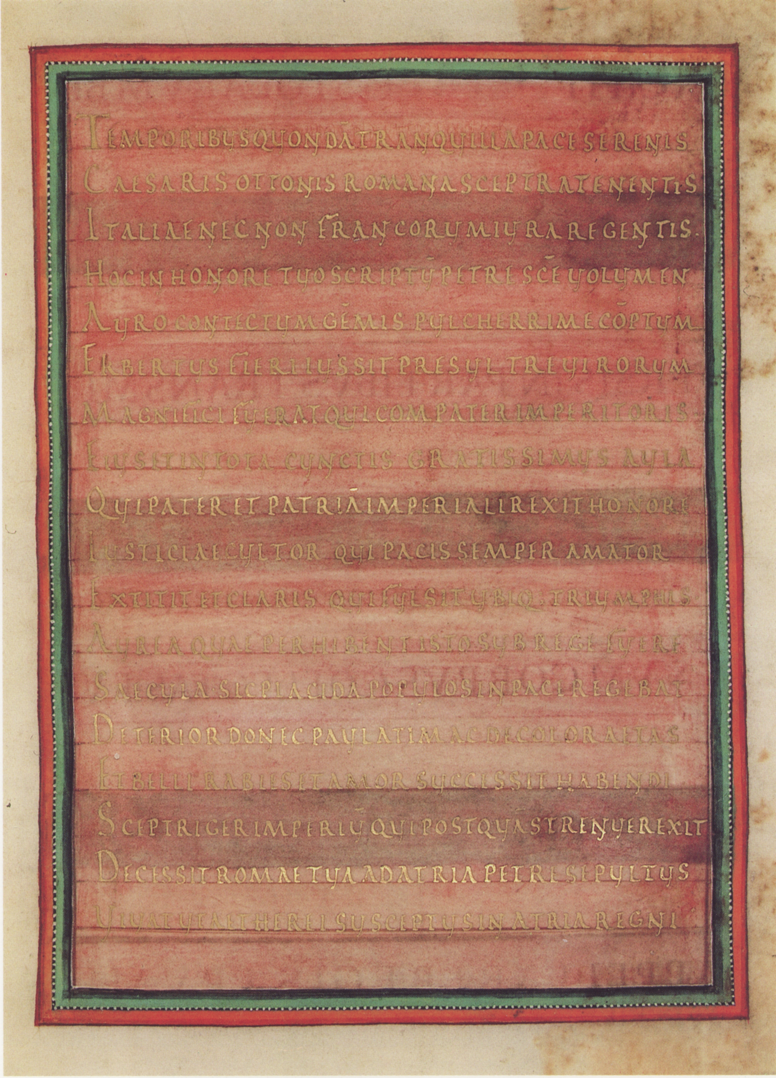 fol. 1r einer in Teilen erhaltenen Registrum Gregorii Handschrift, Trier, um 983/984. Trier, Stadbibliothek, Hs. 171/1626a